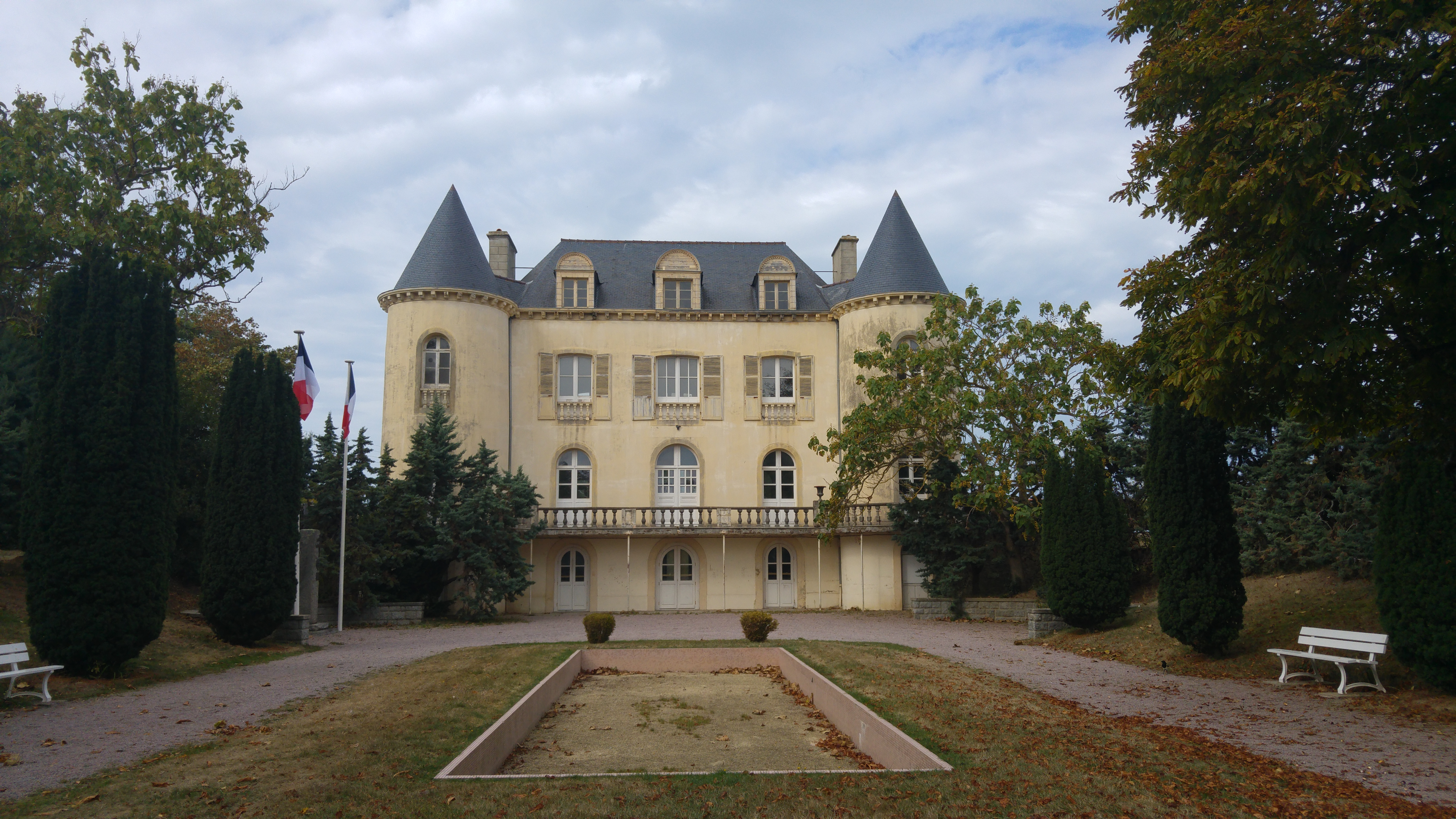 Villa Eugénie, septembre 2019, située derrière l'église de Dinard